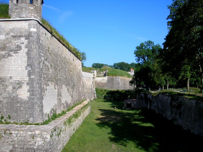 Festung Wülzburg über Weißenburg (Mittelfranken) / Fortress Wuelzburg near Weissenburg, Middle Franconia, Germany. Renaissancebefestigung und Tor / Renaissance fortifications and gate. Eigene Aufnahme, Juli 2006 / Own Photo, July 2006